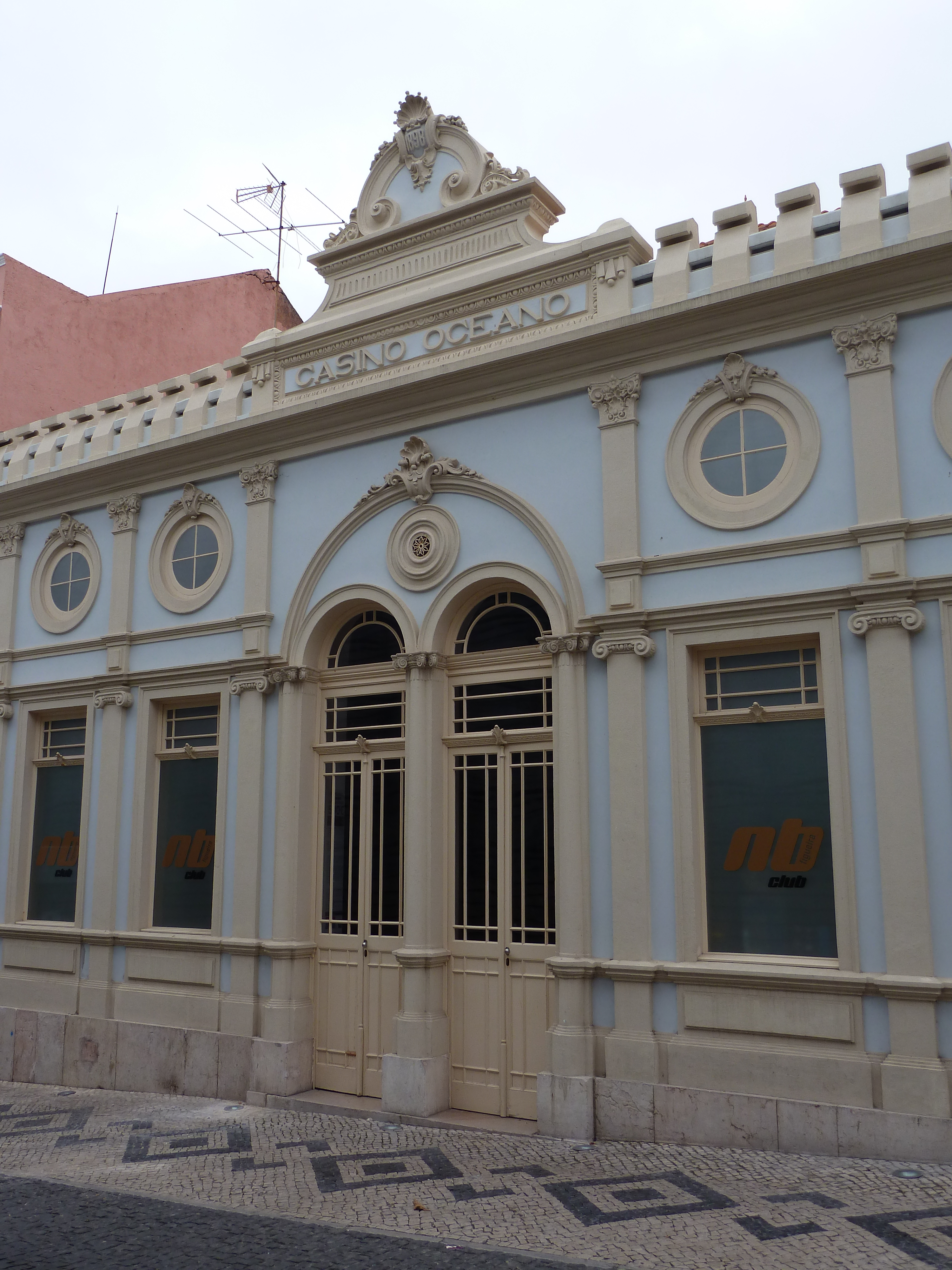 Casino Océano. Figueira da Foz This file was uploaded for Wiki Loves Monuments in Portugal with the unique identifier 71190.